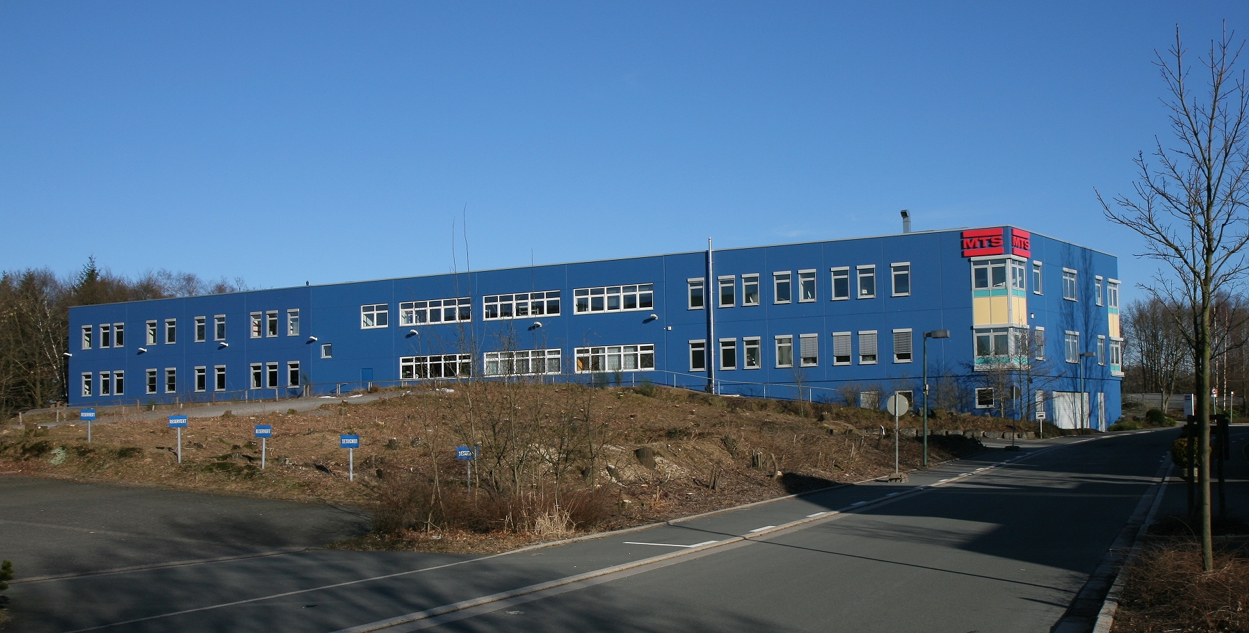 Gebäude der Firma MTS Sensor in Lüdenscheid, Auf dem Schüffel 9